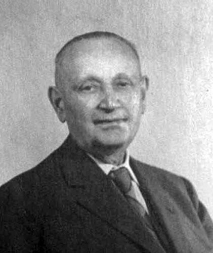 Der Gründer des Café Corso Ernst Fischer